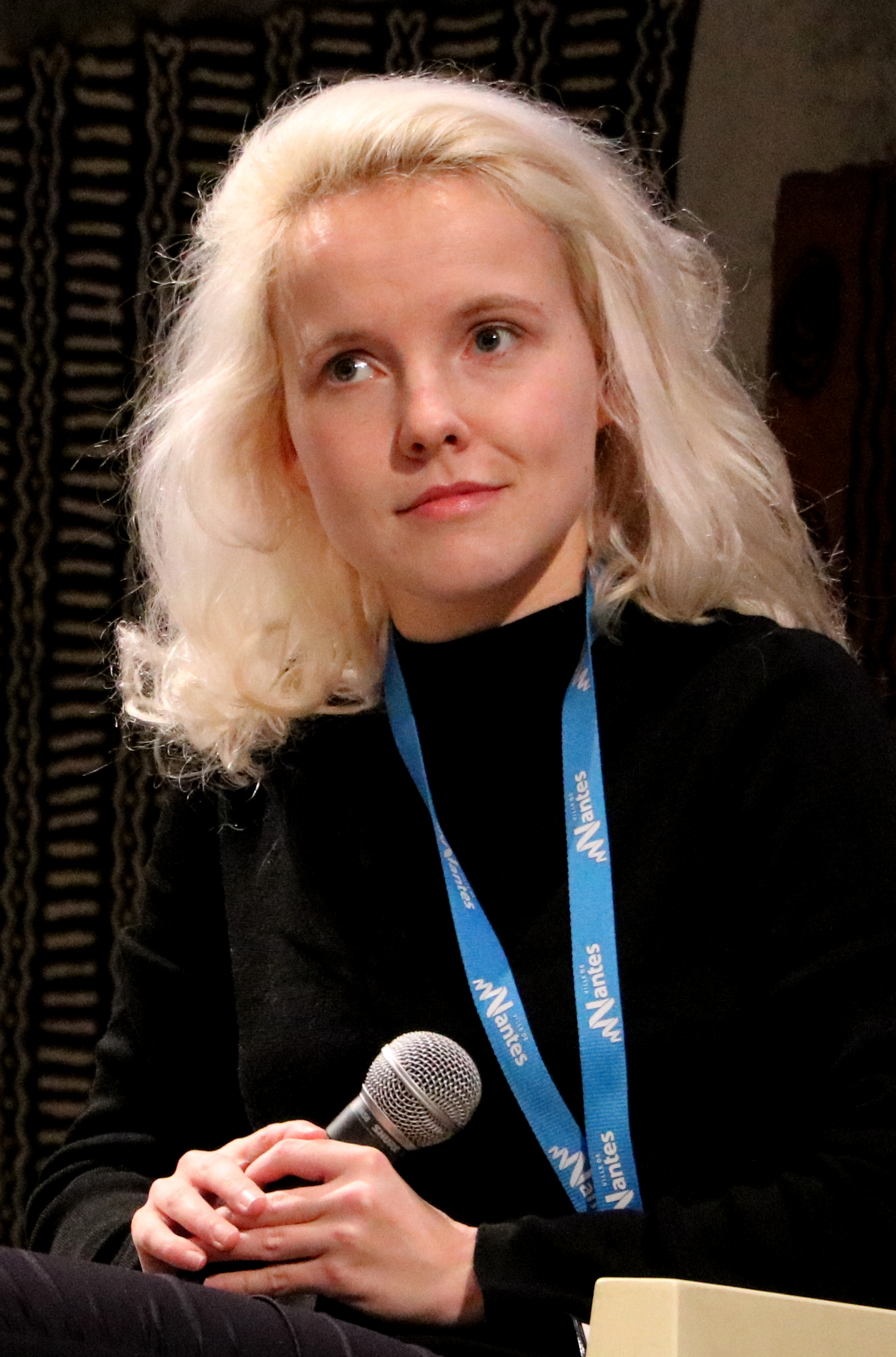 Cécile Coulon lors du Festival Atlantide - Les Mots du Monde à Nantes, le Lieu Unique, le 17 février 2018.